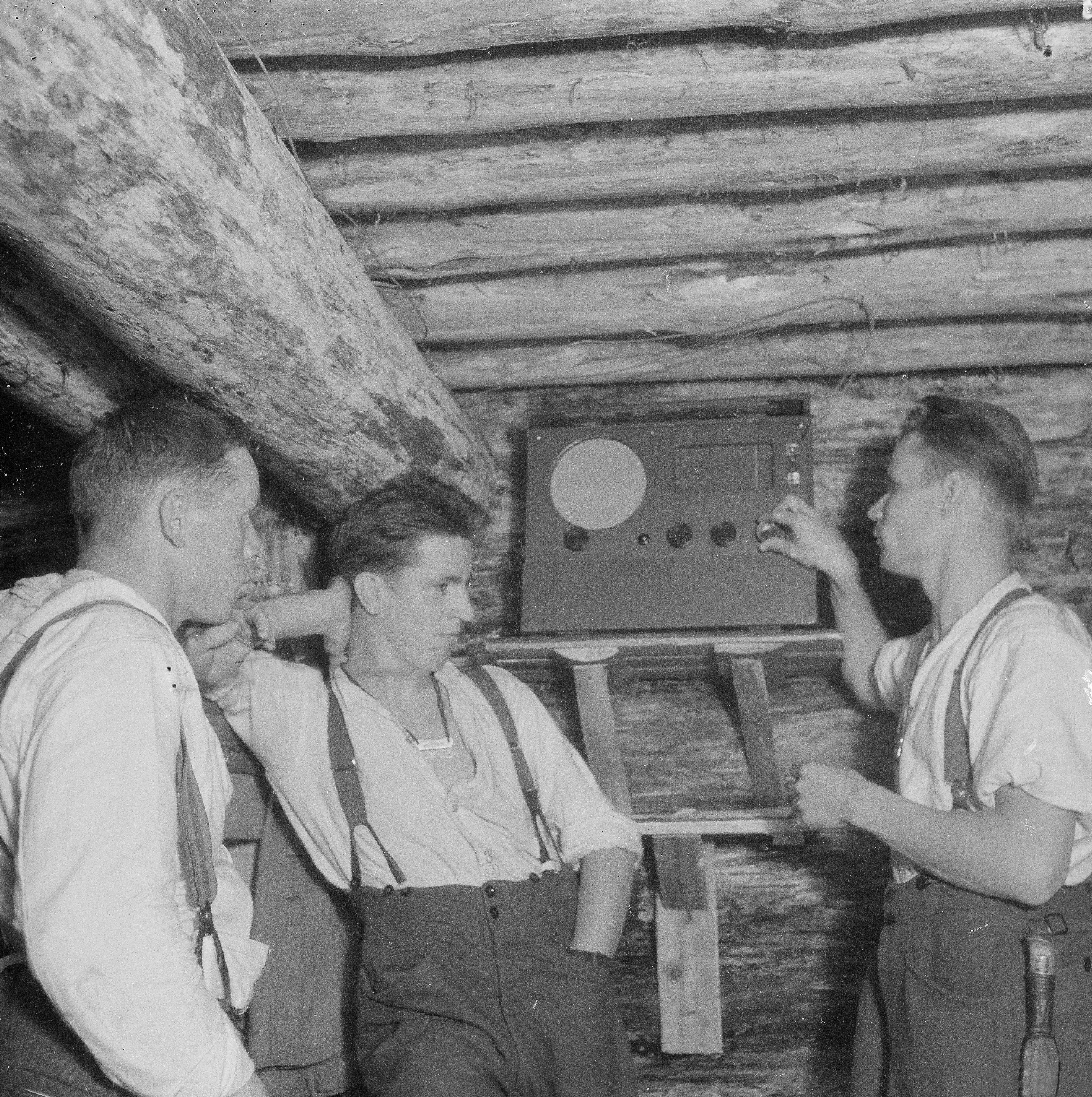 Suomalaiset kuuntelevat välirauhan ehdot radiosta. SA-kuvat